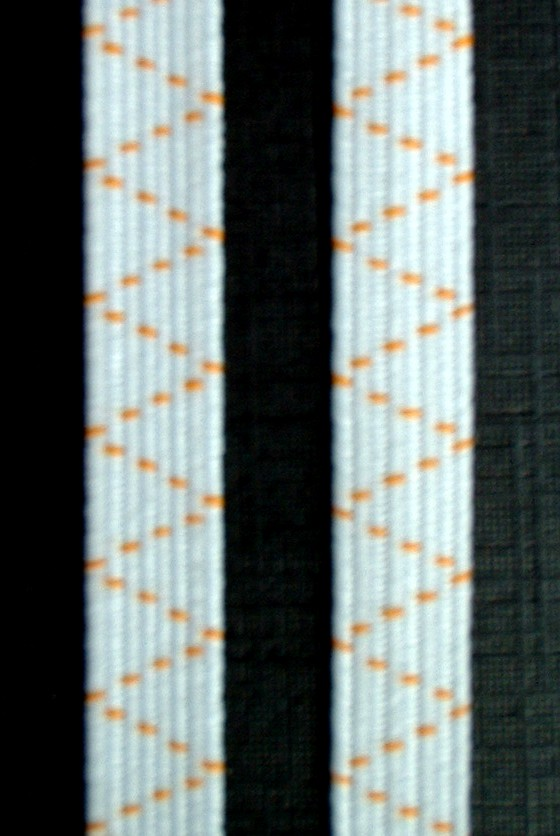 Gummilitze aus Polyester und Elastodien